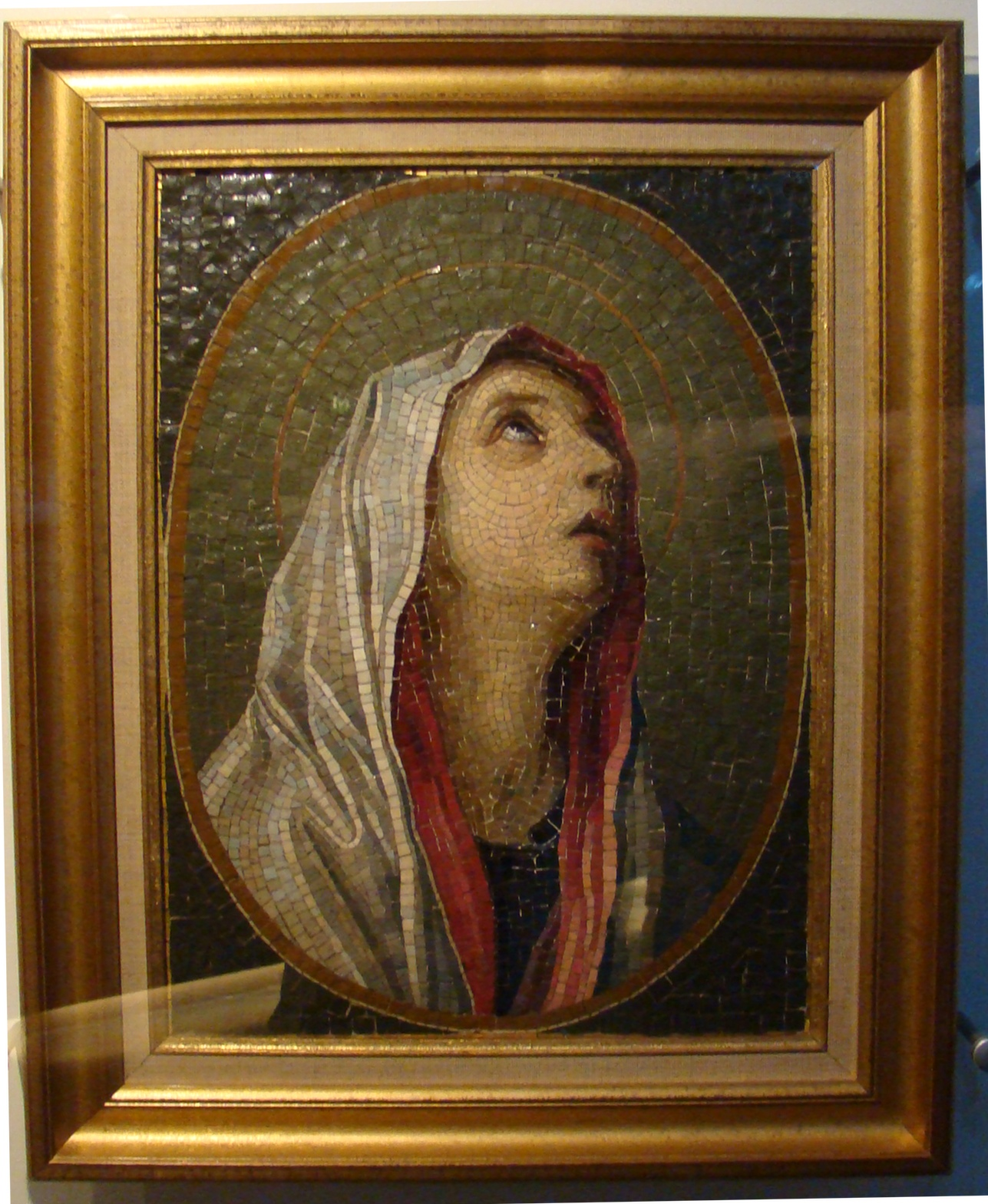 Vierge de Odorico Père, vers 1897, smaltes (pâte de verre) Le tableau est probablement présenté à l'exposition régionale des Beaux-Arts, de l'Industrie et du Commerce de Rennes en 1897. Il était également représenté sur les cartes postales publicitaires de l'entreprise Odorico.